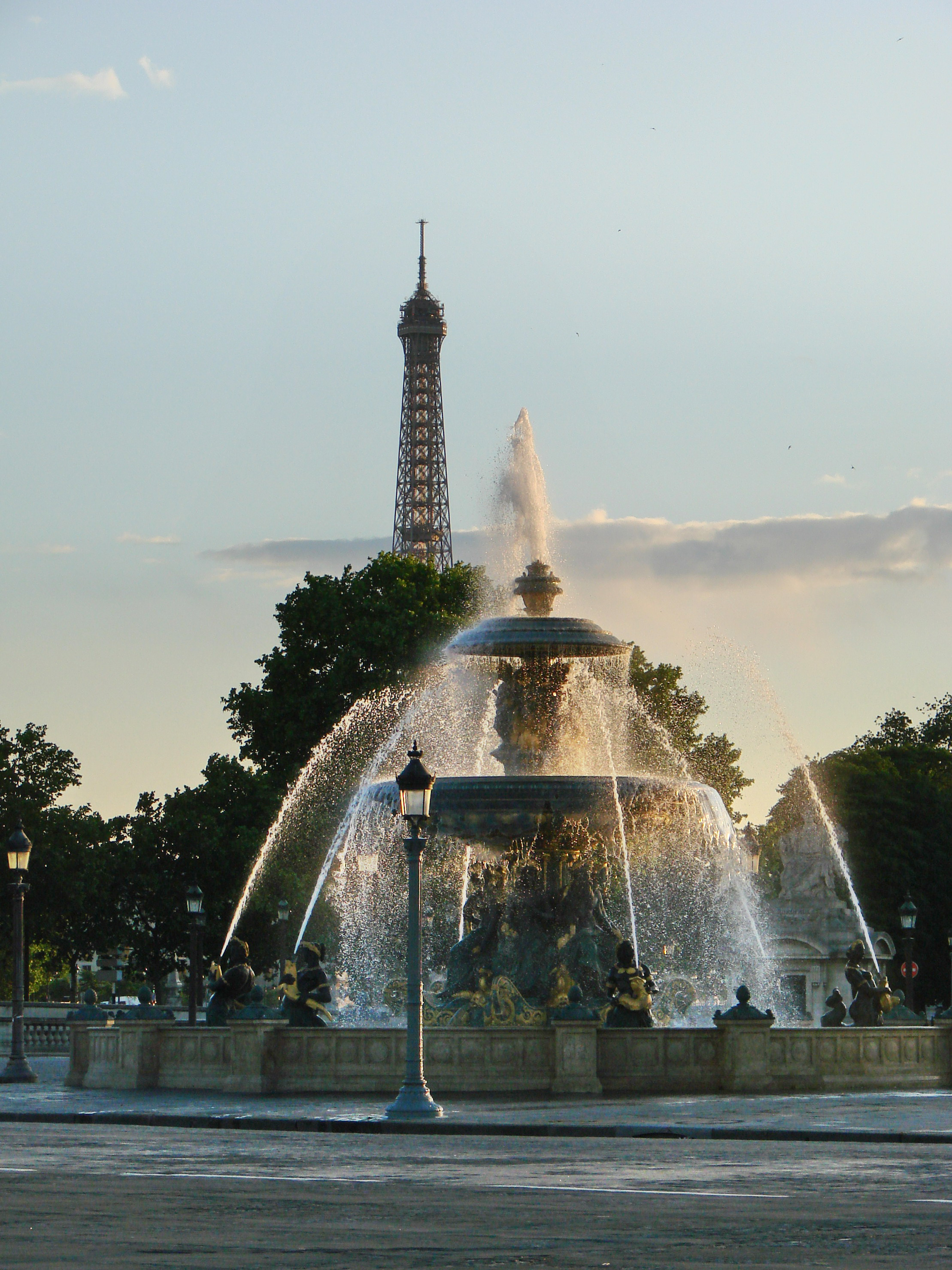 Une des deux fontaines de la Place de la Concorde à Paris, avec la Tour Eiffel à l'arrière-plan.